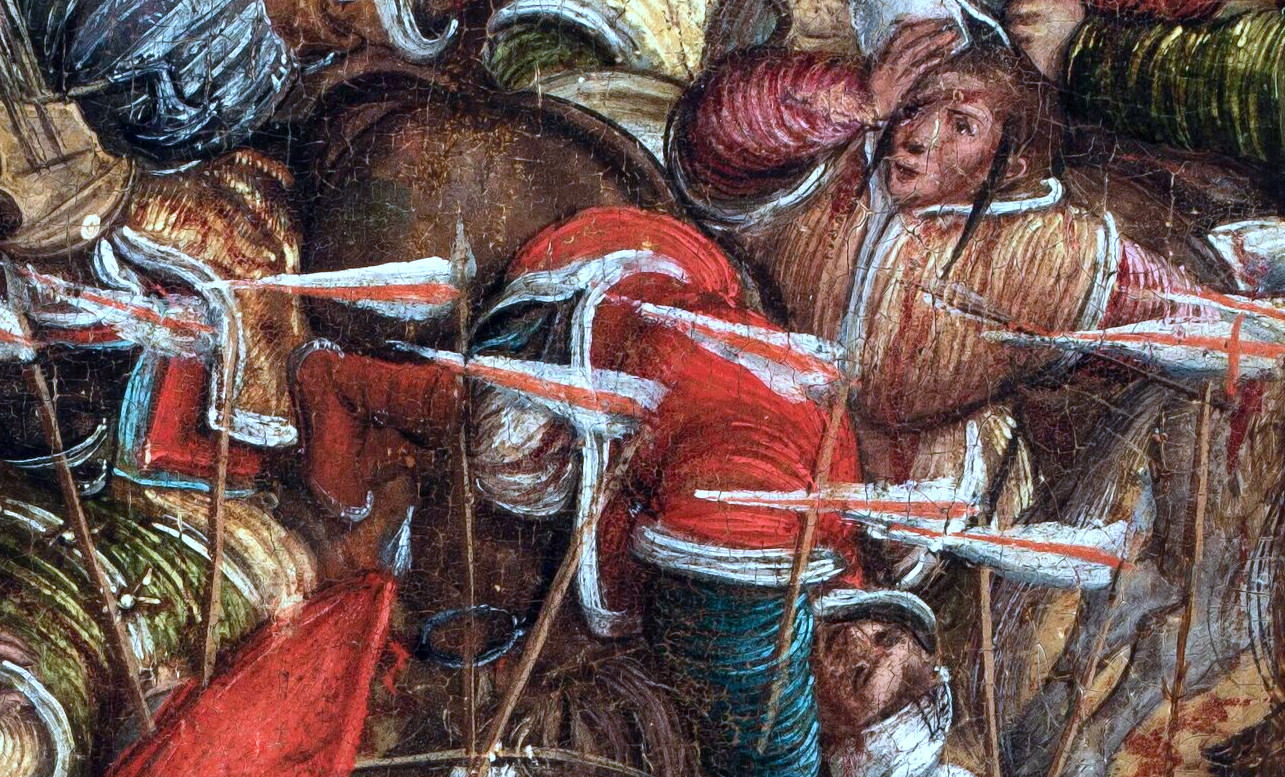 Беларуская (тарашкевіца): Бел-чырвона-белыя сьцягі на карціне Ганса Крэла «Бітва пад Воршай».